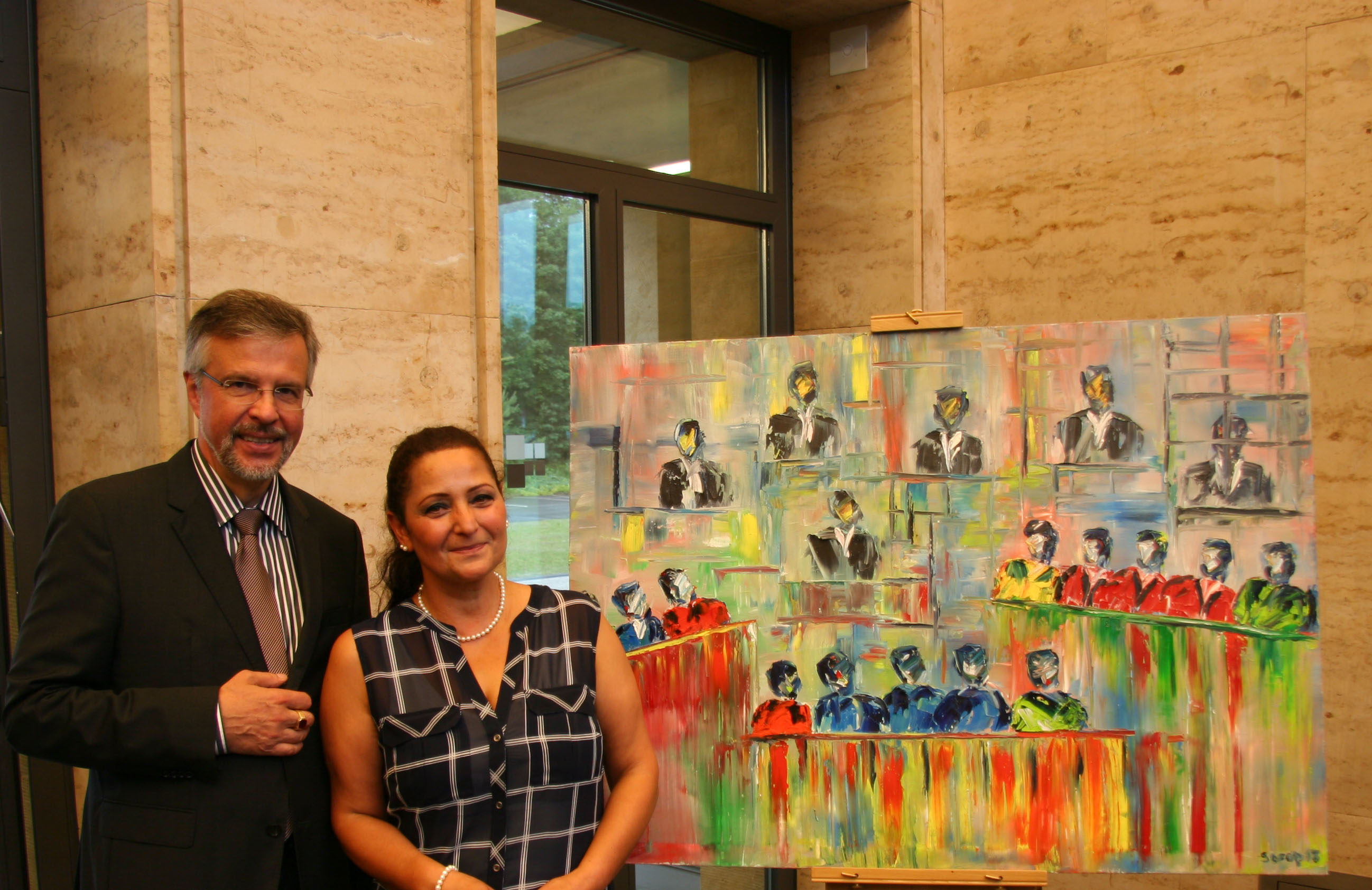 Instanzenzug, 2013, Öl auf Leinwand, 120x87 cm Serap Riedel mit dem Präsidenten des Bundessozialgericht Peter Masuch bei der Vernissage der Ausstellung "Instanzenzug - Eine künstlerische Auseinandersetzung mit Recht und Gerechtigkeit" am 10. Juli 2014